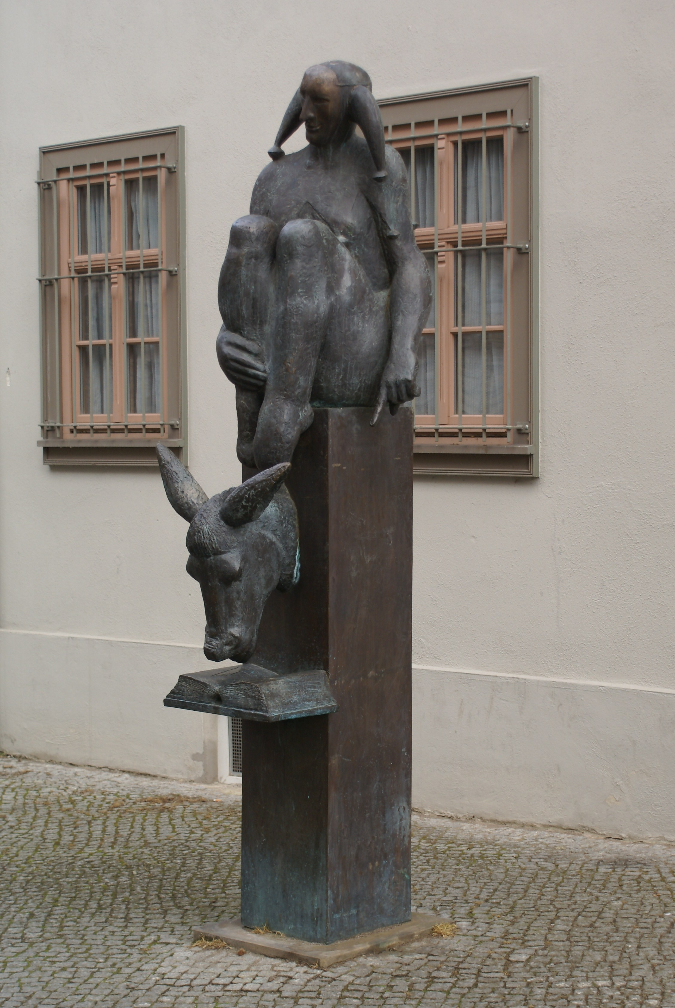 Denkmal "Wie Till Eulenspiegel einem Esel das lesen lehrte" - An der Stadtmünze/Rathausgasse in Erfurt.